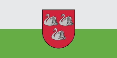 Kategorija:Gulbenes novads Kategorija:Latvijas novadu karogi